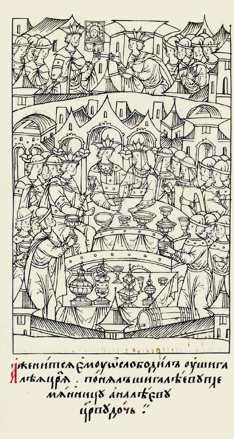 Миниатюра Лицевого летописного свода XVI в.: [В том же году в мае выехал к государю из Астрахани царевич Кайбула, сын царя Ах- кубека, и царь государь его пожаловал, дал ему город Юрьев с данью,] и жениться ему позво- лил, взял у Шигалея- царя племянницу, дочь царя Яналея.